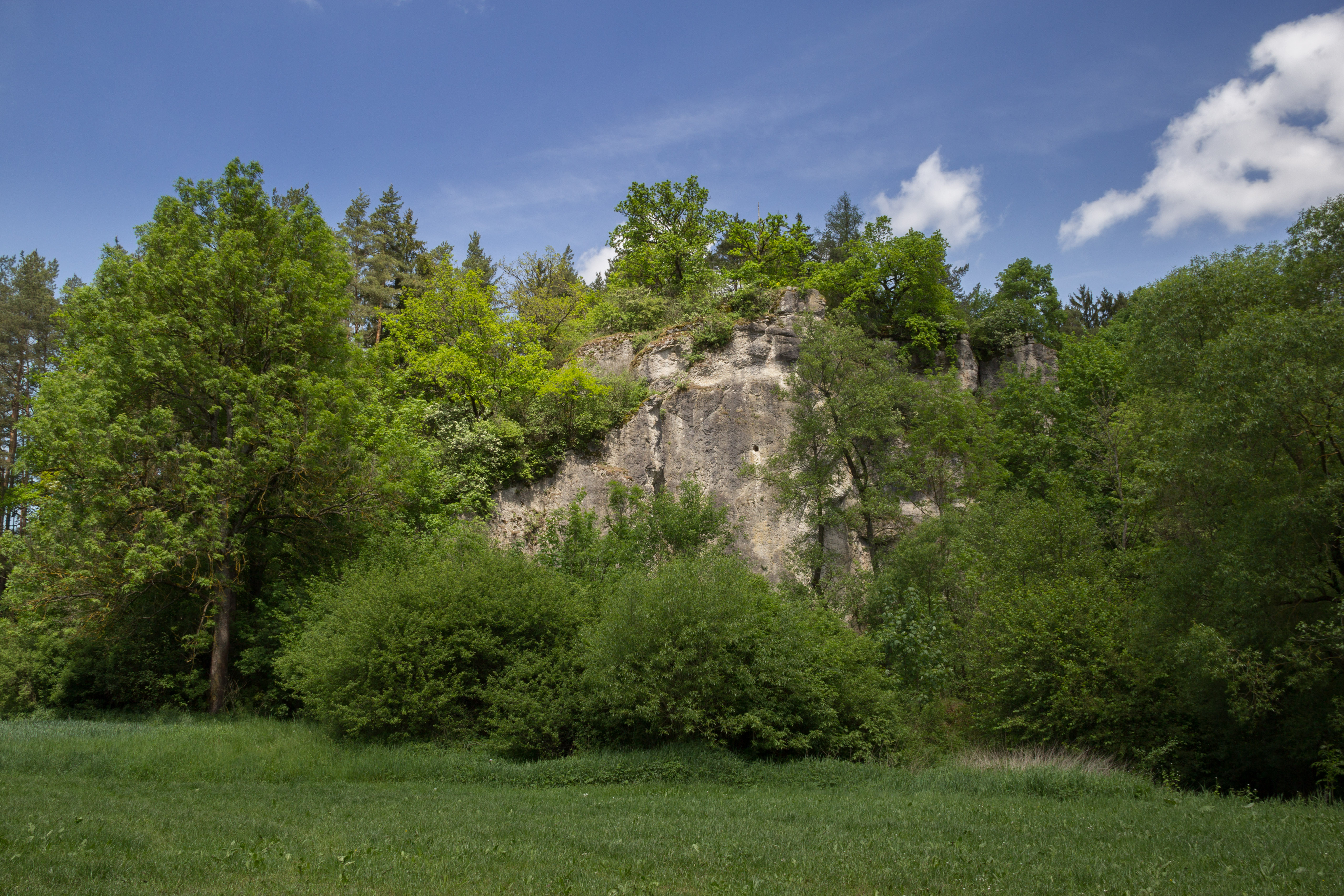 Schmelcherfels, Geotop, Naturdenkmal, Naturpark und LSG Fränkische Schweiz-Veldensteiner Forst, Steinamwasser